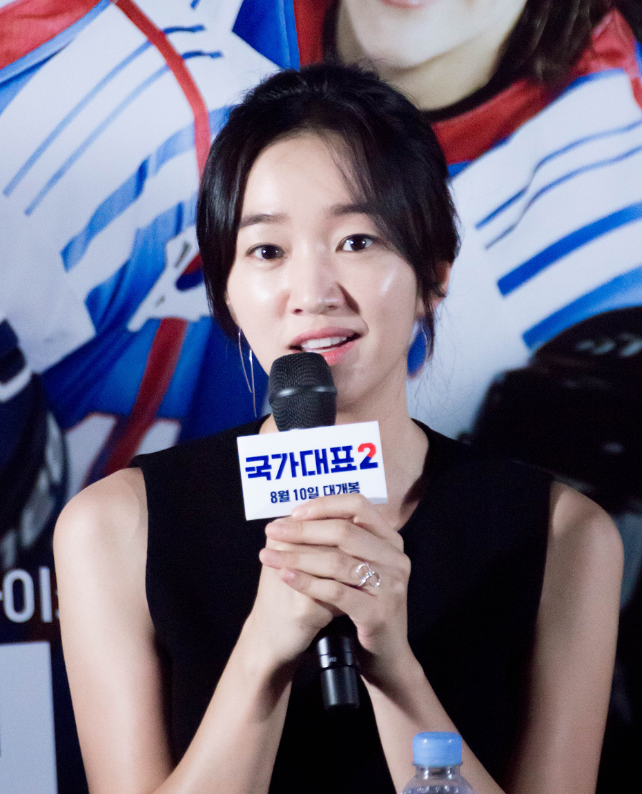 160804 국가대표2 무비토크 수애